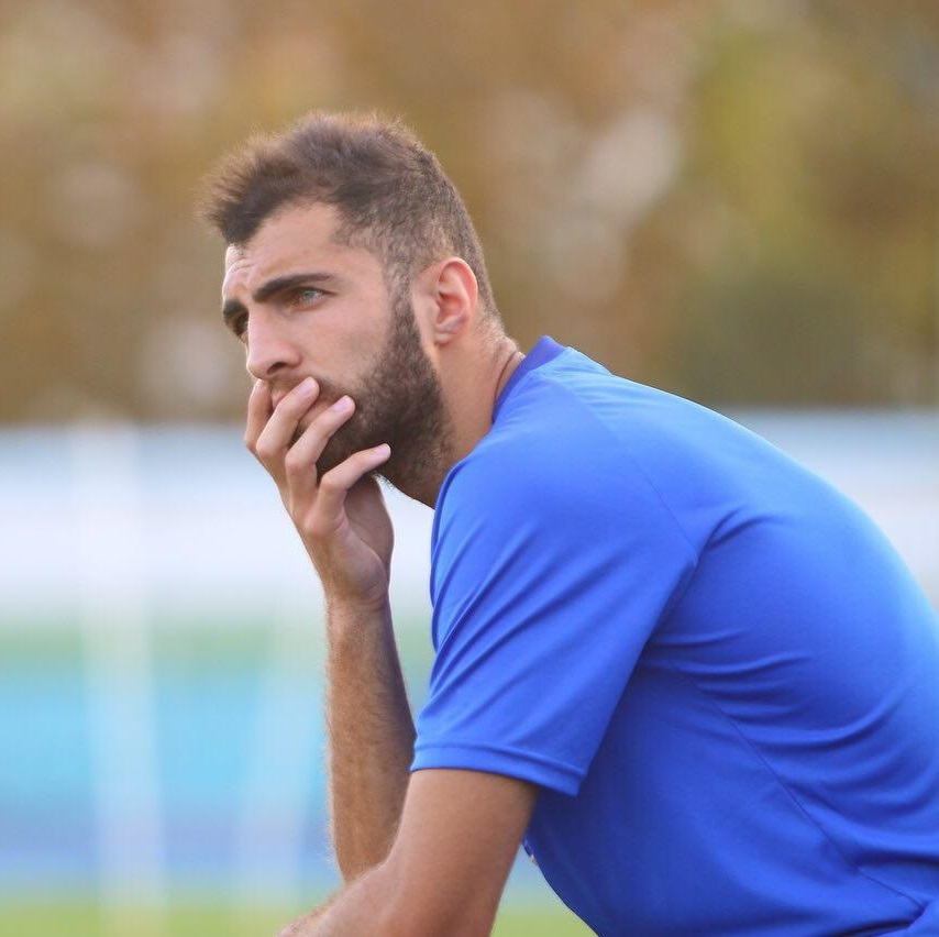 گزارش تصویری از تمرین تیم فوتبال استقلال در مهر ۱۳۹۷